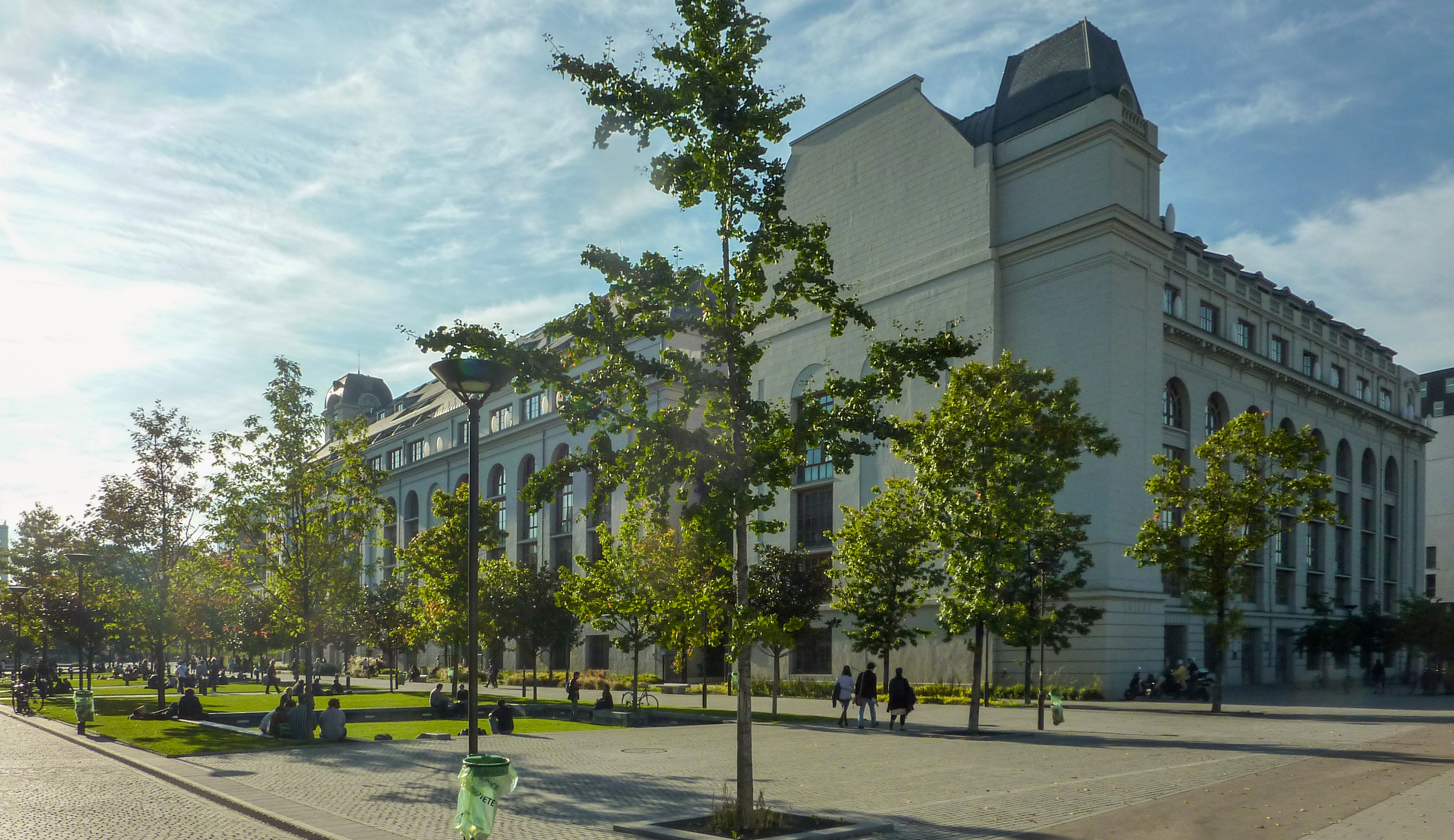 Université de Paris Rive Gauche Français cadien: L'Université de Diderot a Paris Rive Gauche